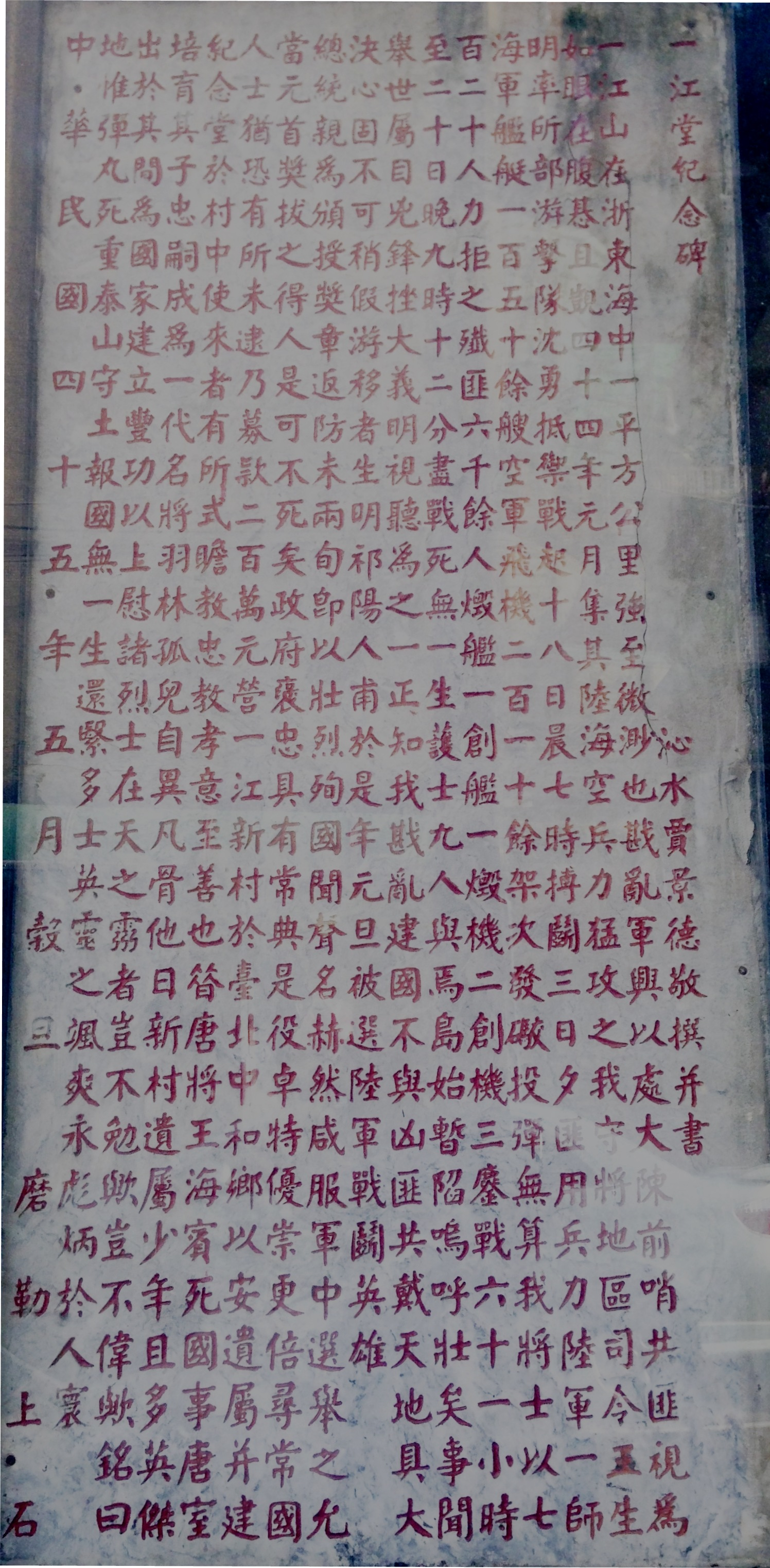 新北市中和區一江新城一江山紀念碑